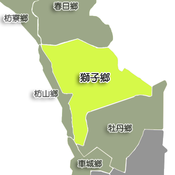 屏東縣獅子鄉相對位置。